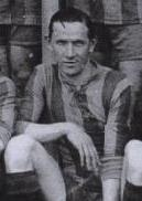 Ennis Hayes en 1919 con la camiseta de Rosario Central.